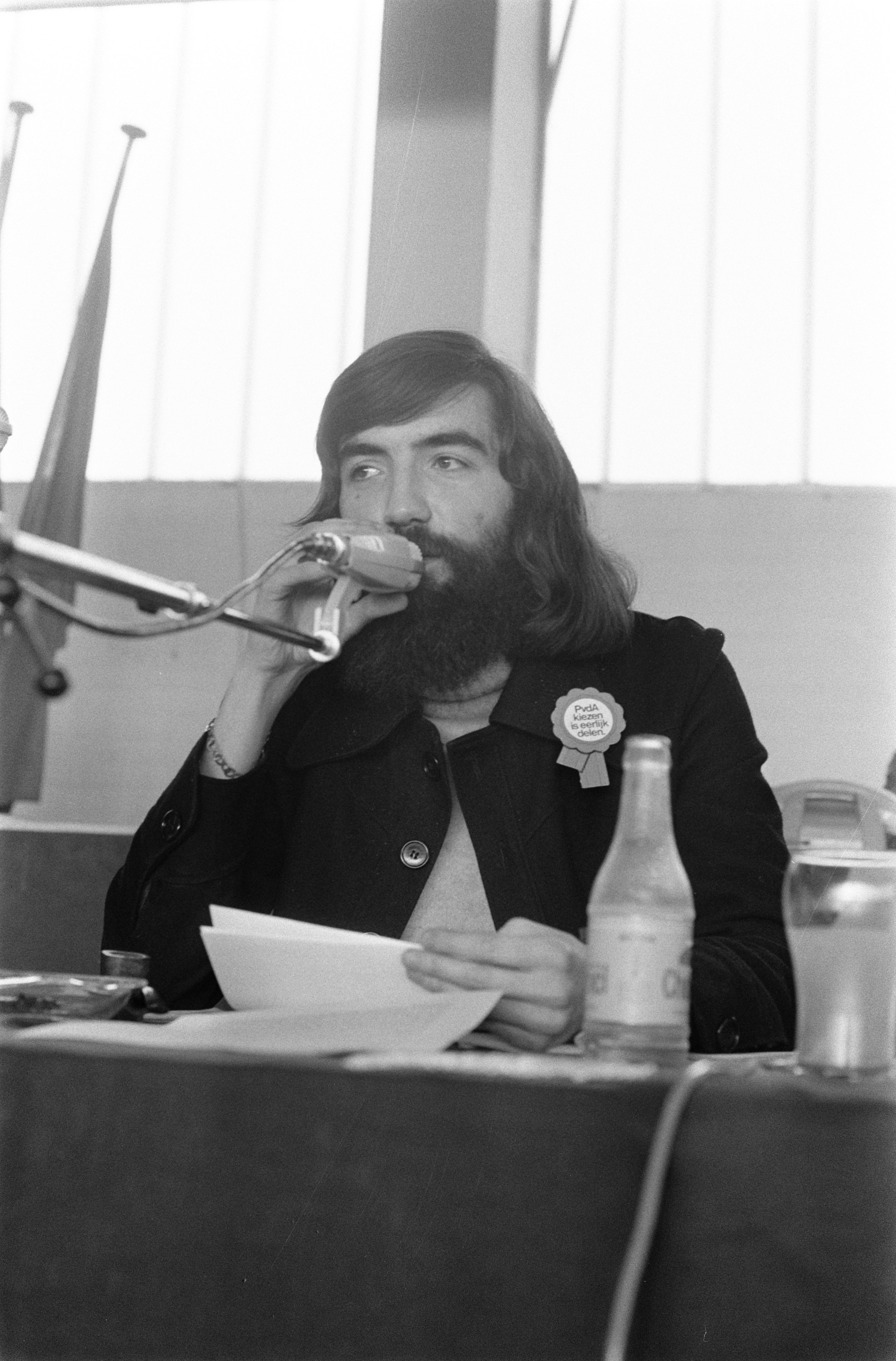 Collectie / Archief : Fotocollectie Anefo Reportage / Serie : Het PvdA-congres in Breda Beschrijving : Max van den Berg (wethouder in Groningen) Datum : 26 januari 1974 Locatie : Breda, Noord-Brabant Trefwoorden : congressen, politieke partijen, portretten, wethouders Persoonsnaam : Berg, Max van den Fotograaf : Fotograaf Onbekend / Anefo Auteursrechthebbende : Nationaal Archief Materiaalsoort : Negatief (zwart/wit) Nummer archiefinventaris : bekijk toegang 2.24.01.05 Bestanddeelnummer : 926-9673